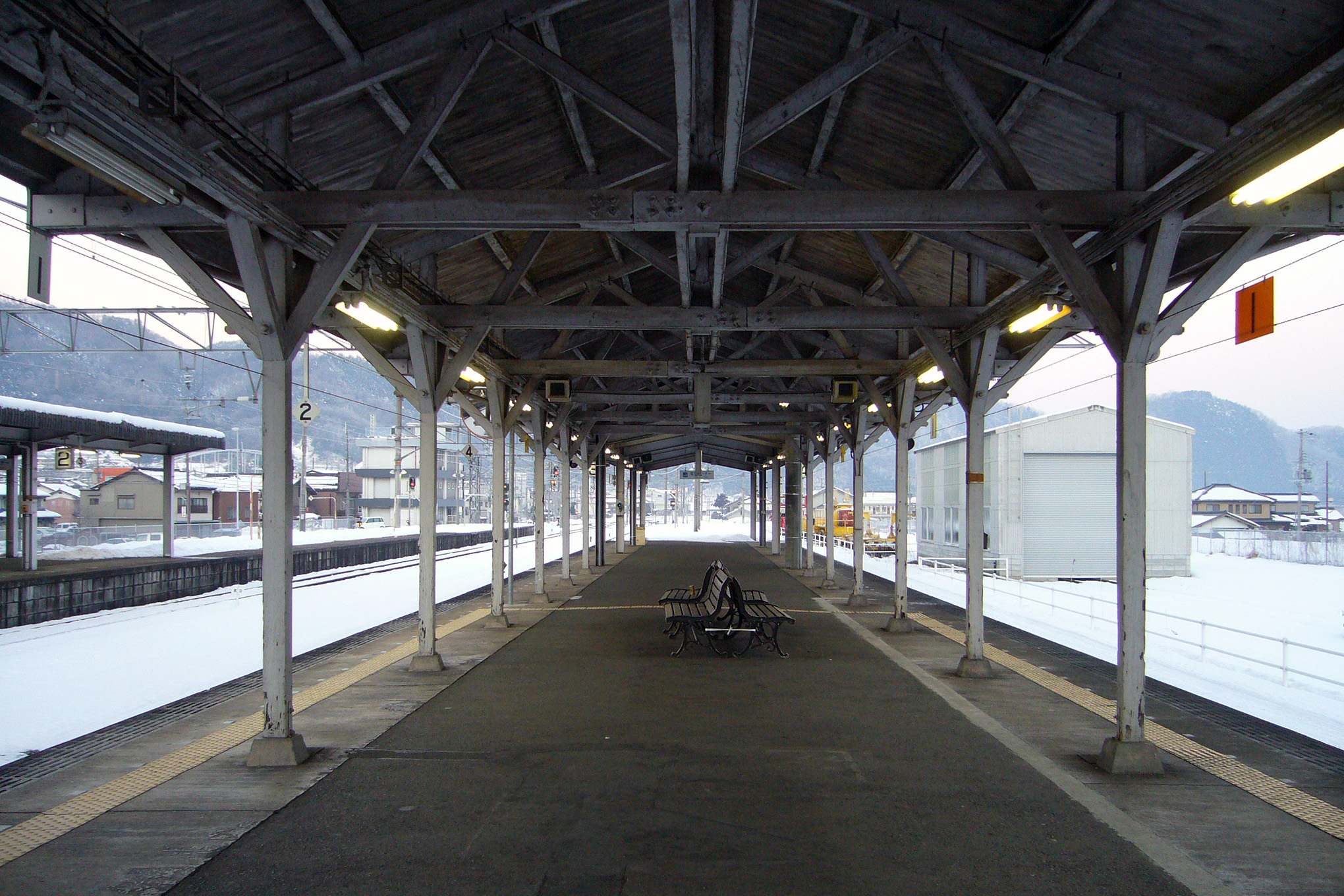 Wadayama Station in Asago, Hyogo, Japan